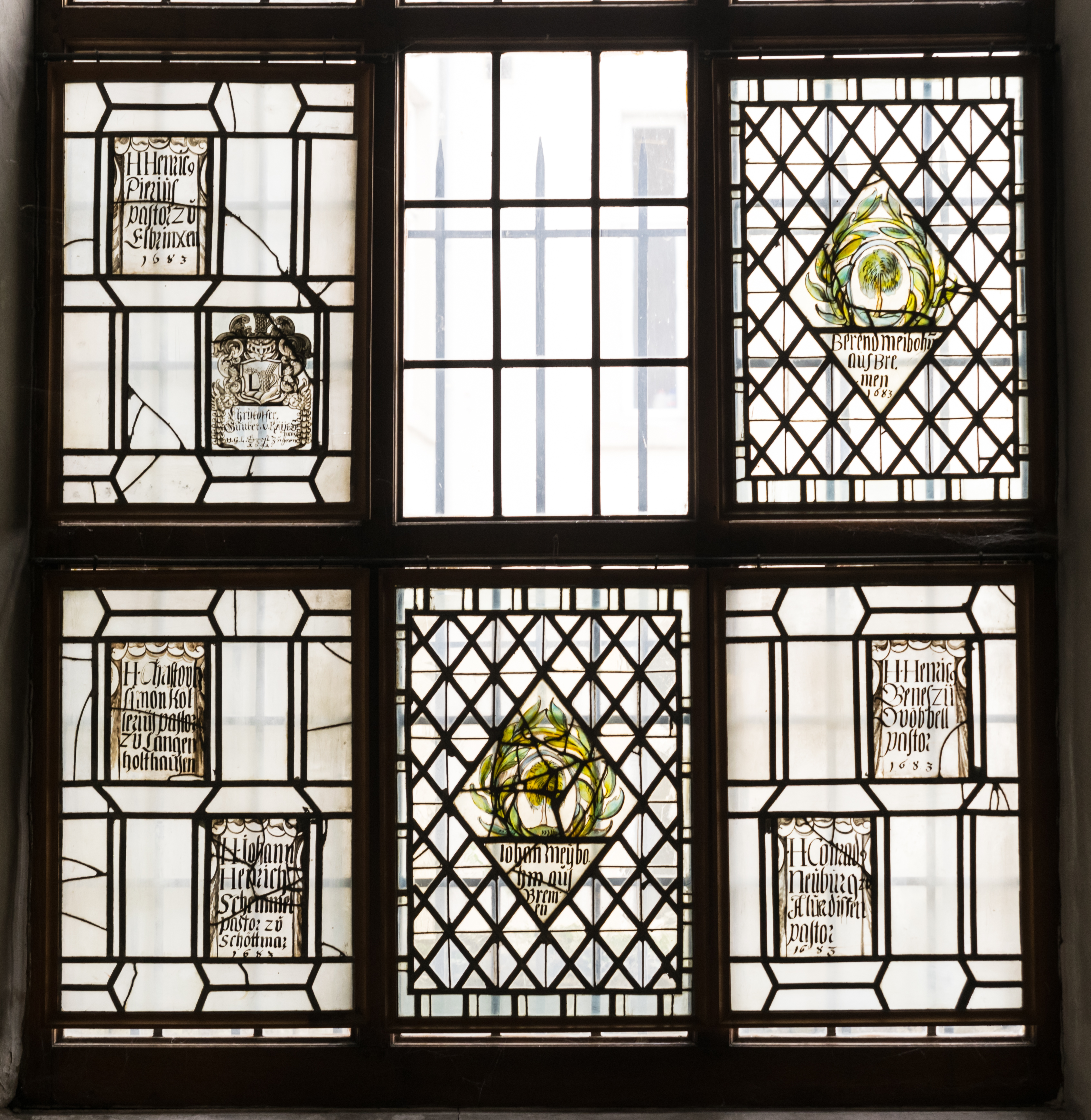 Stifterfenster des 17. Jahrhunderts aus der Kirche Haustenbeck, heute im Lippischen Landesmuseum Detmold